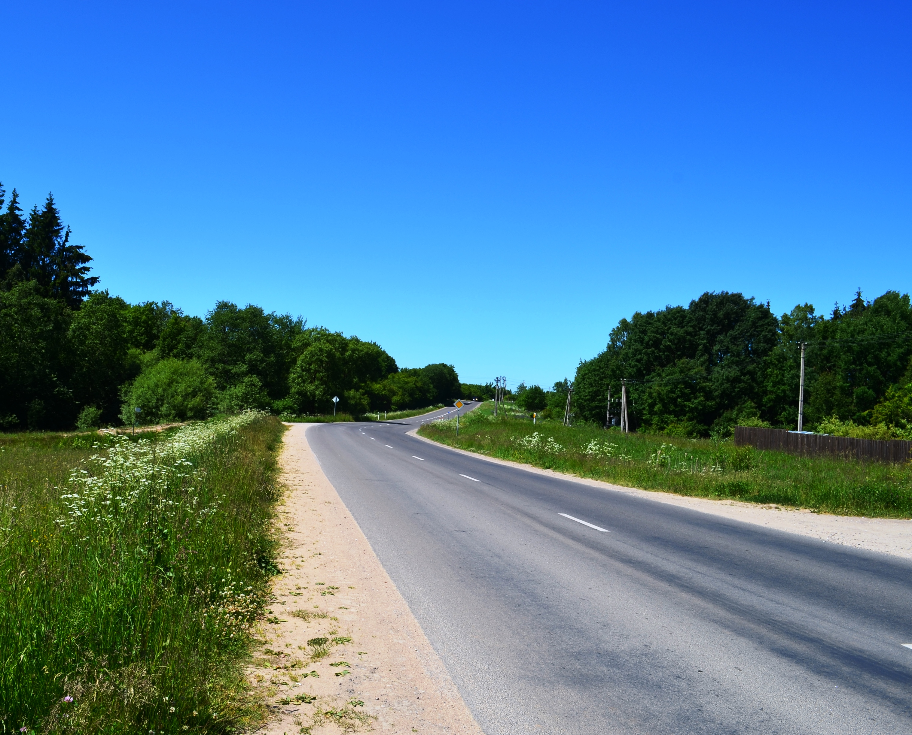 Krašto kelias 171 ties Avižieniais